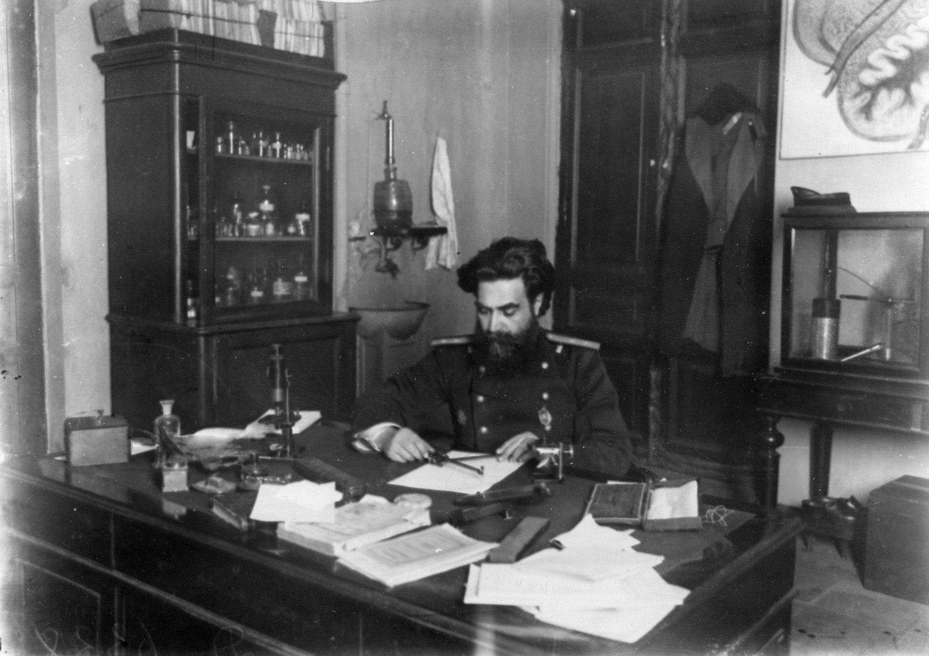 Доктор медицины, ординарный профессор академии Тархан-Моуравов Иван Романович в кабинете академии